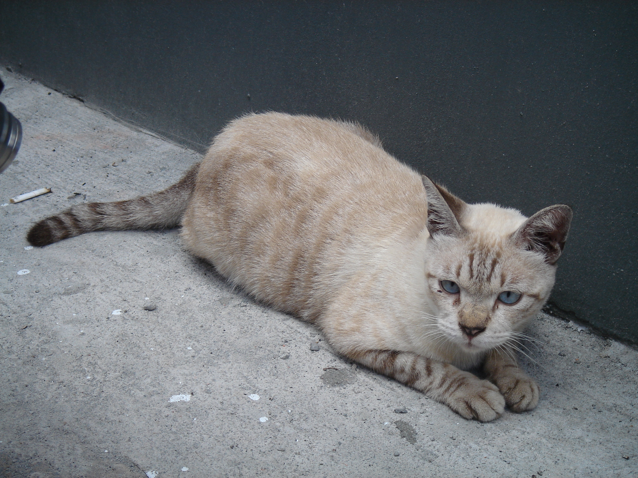 台灣猴硐的拍攝到的貓隻